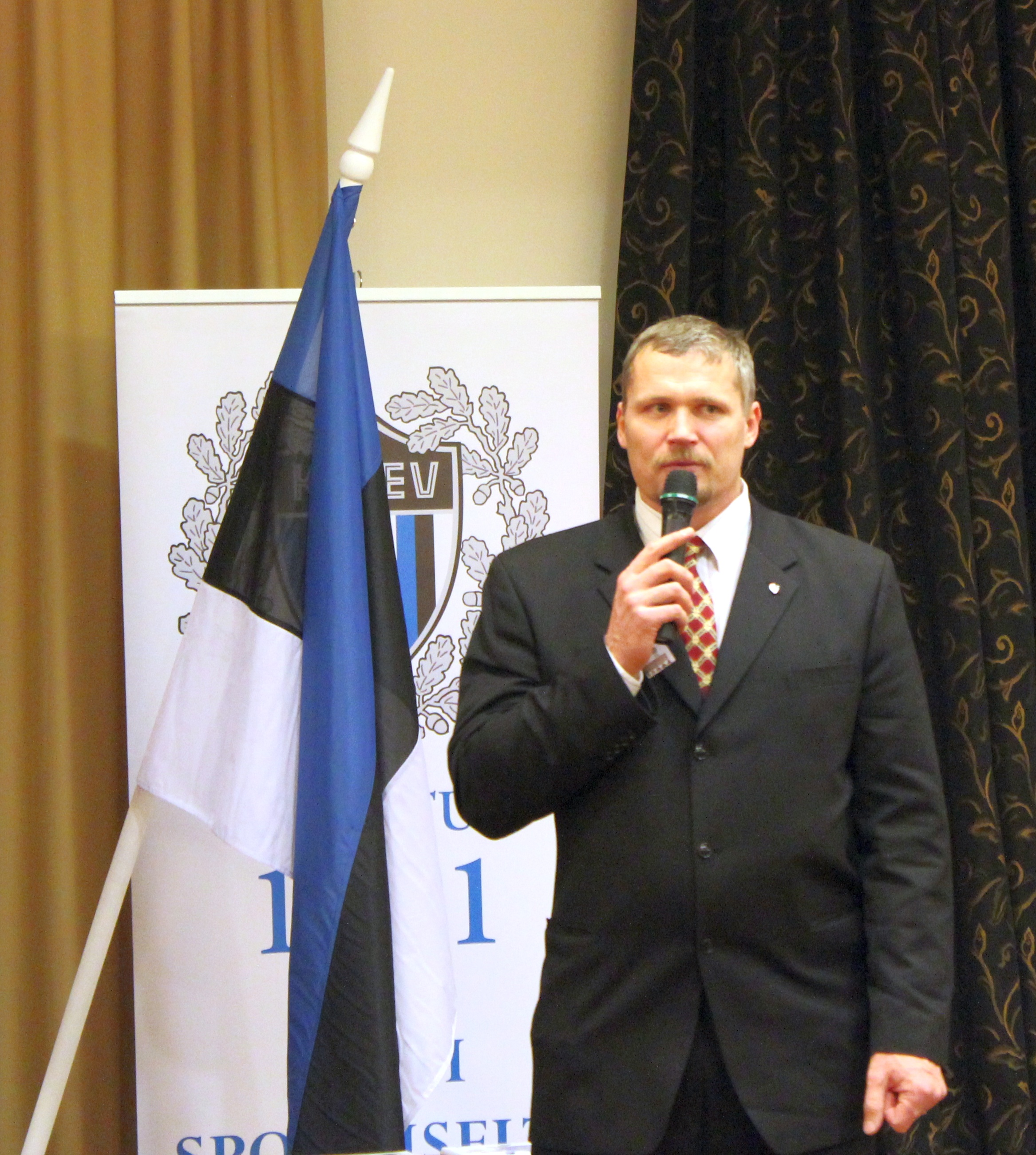 Aleksander Tammert maleturniiri "Meenutades Paul Kerest" avamisel.